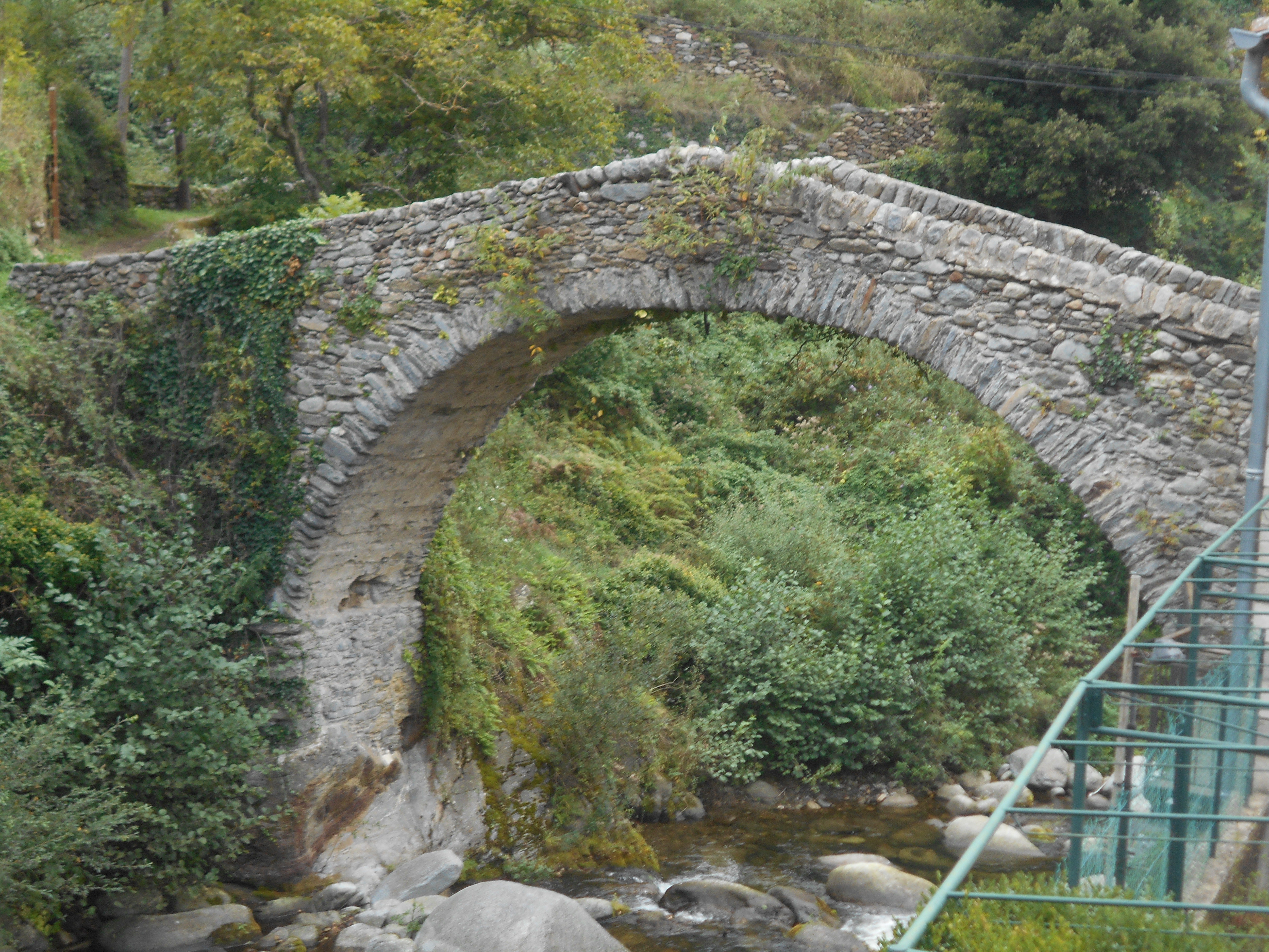 Pont de la Farga, a Vallestàvia (Conflent)